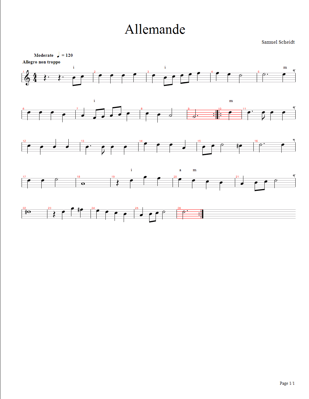 Allemande notation